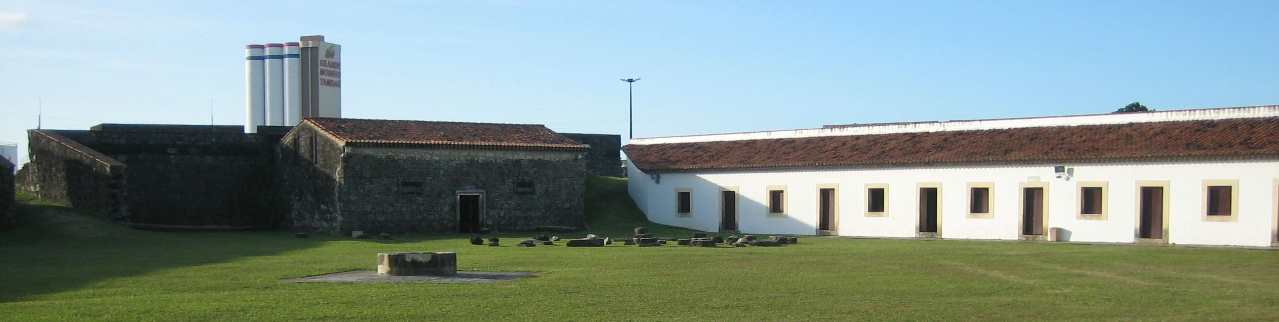 Fortaleza Santa Catarina Powder house and barracks, in Cabedelo, Paraíba, Brasil